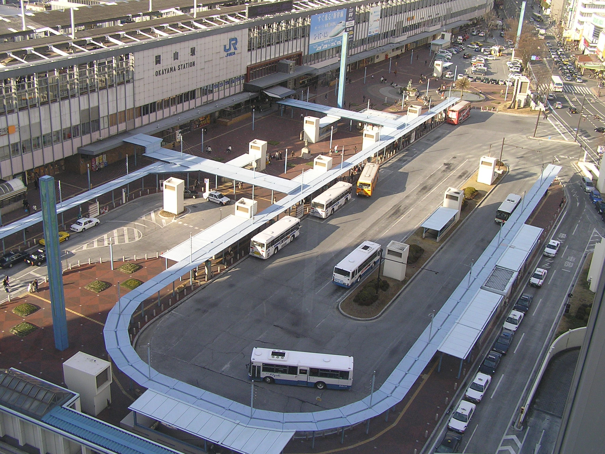 okayama station bus terminal